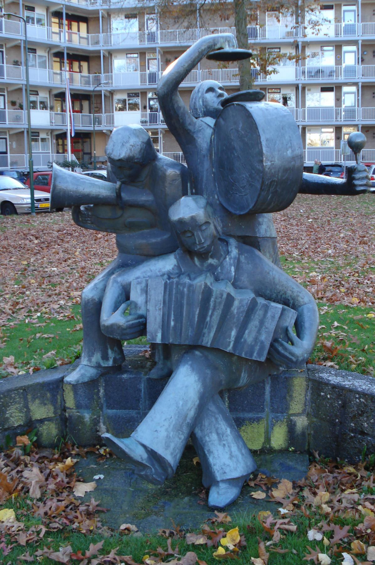 Soest, Dalweg/Albert Cuyplaan. Kunstwerk "Drie Muzikanten" van Piet Riethoven. Soest/The Netherlands. FOP.